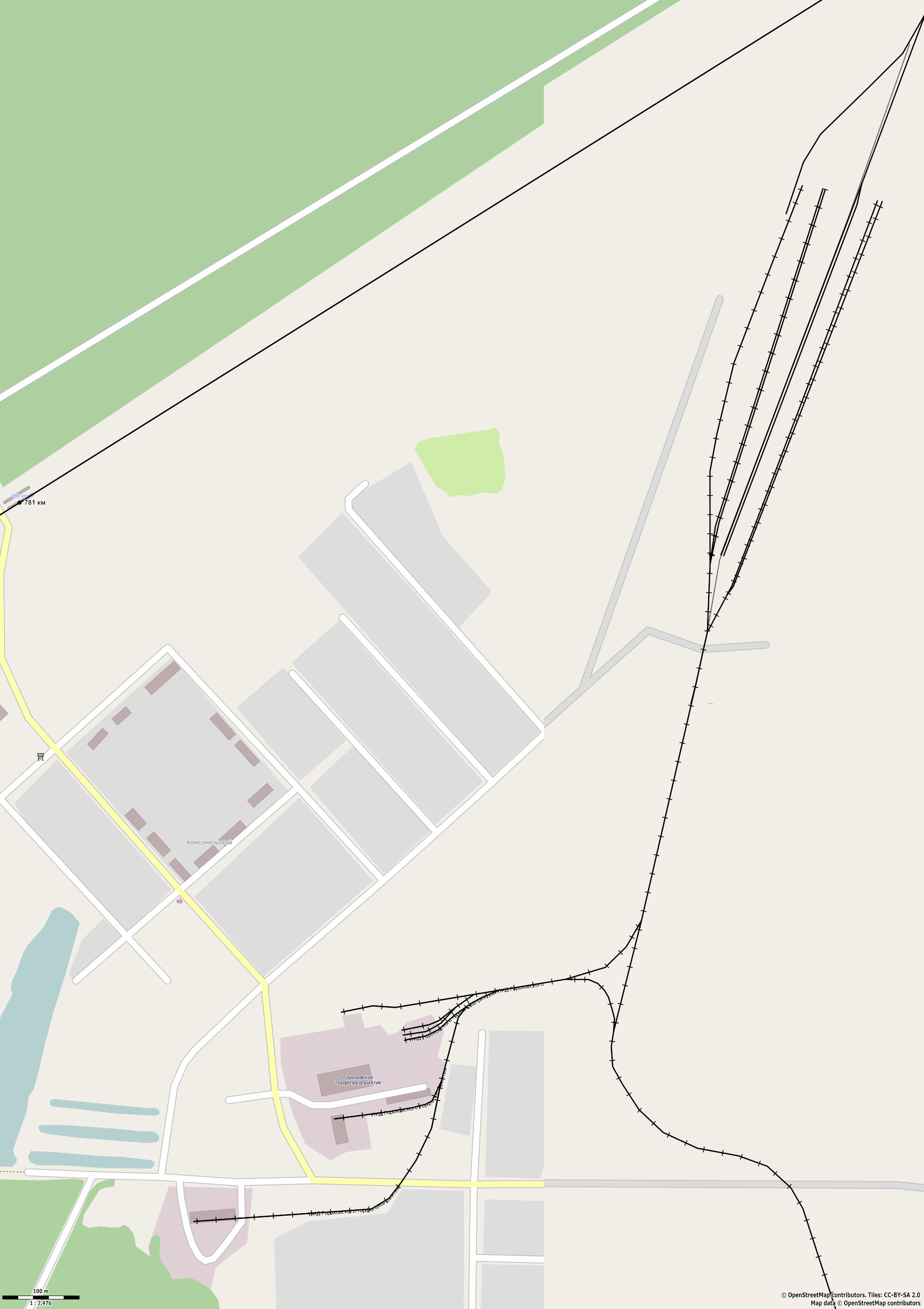 Карта начальной станции УЖД Гороховского торфопредприятия. This map may be incomplete, and may contain errors. Don't rely solely on it for navigation. Border coordinates58.19060287094247.9980580096047←↕→48.018764663199758.1751440729794